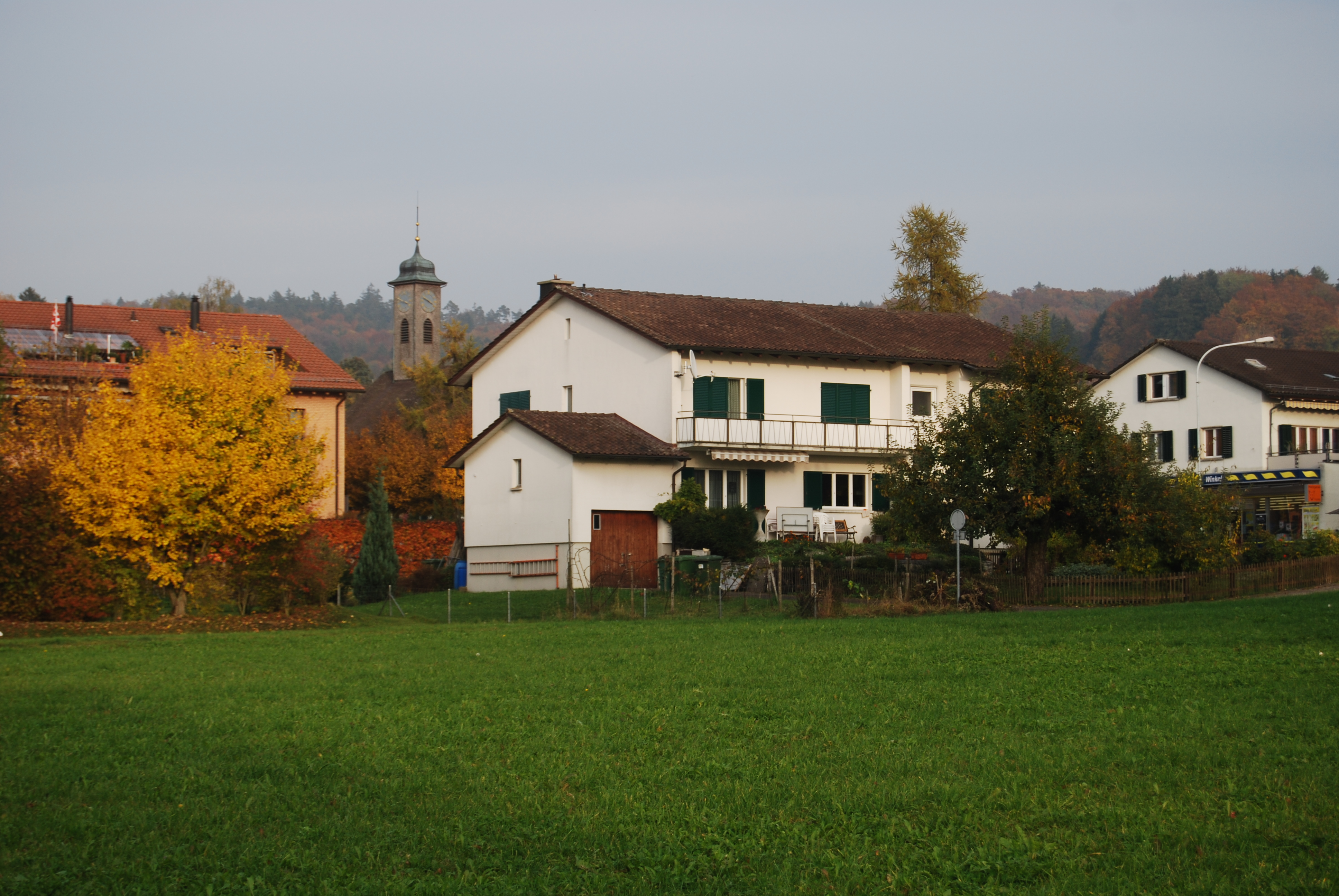 Template:Winkel, canton of Zürich, SwitzerlandEsperanto: Winkel, Kantono Zuriko, Svislando